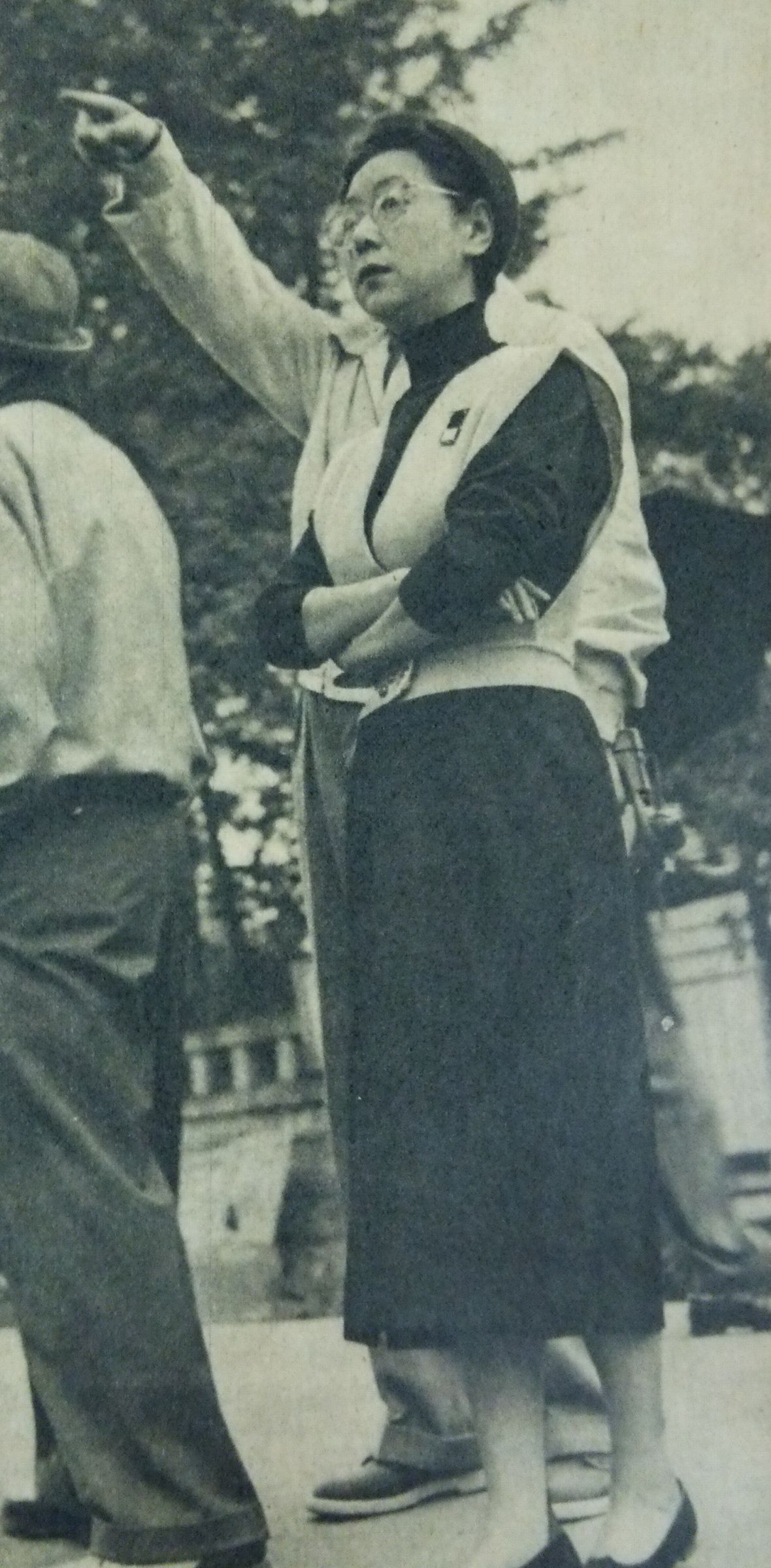 田中絹代（映画『恋文』のロケーション中）